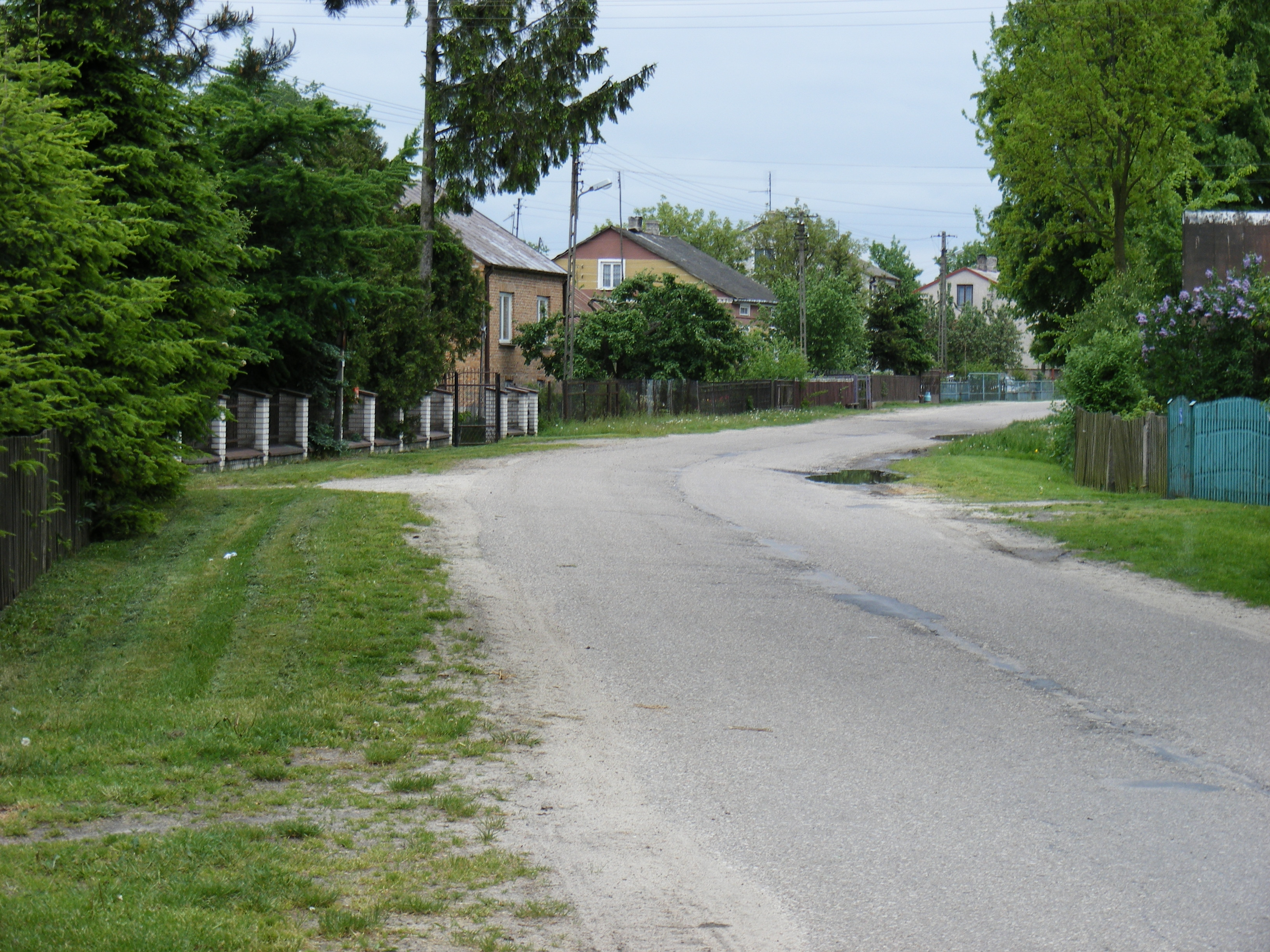 Wólka Konopna - widok na drogę przez wieś.